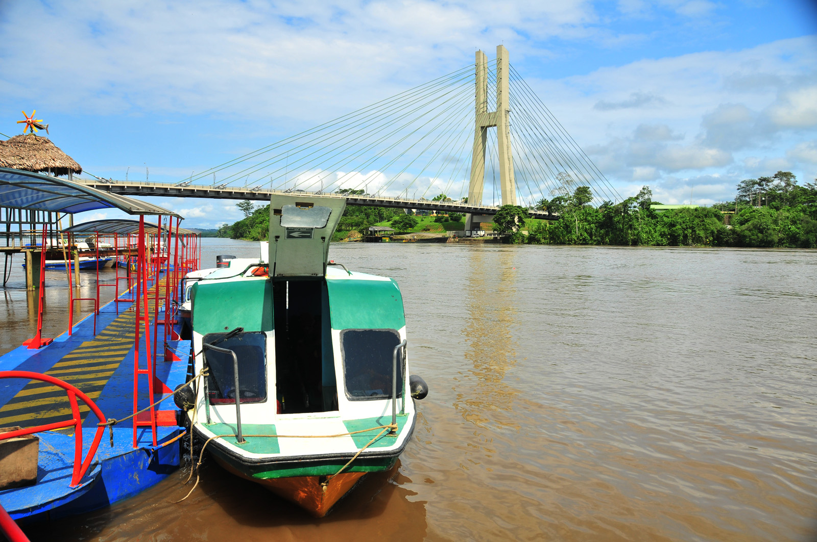 Vista del puente de Francisco de Orellana, Ecuador.